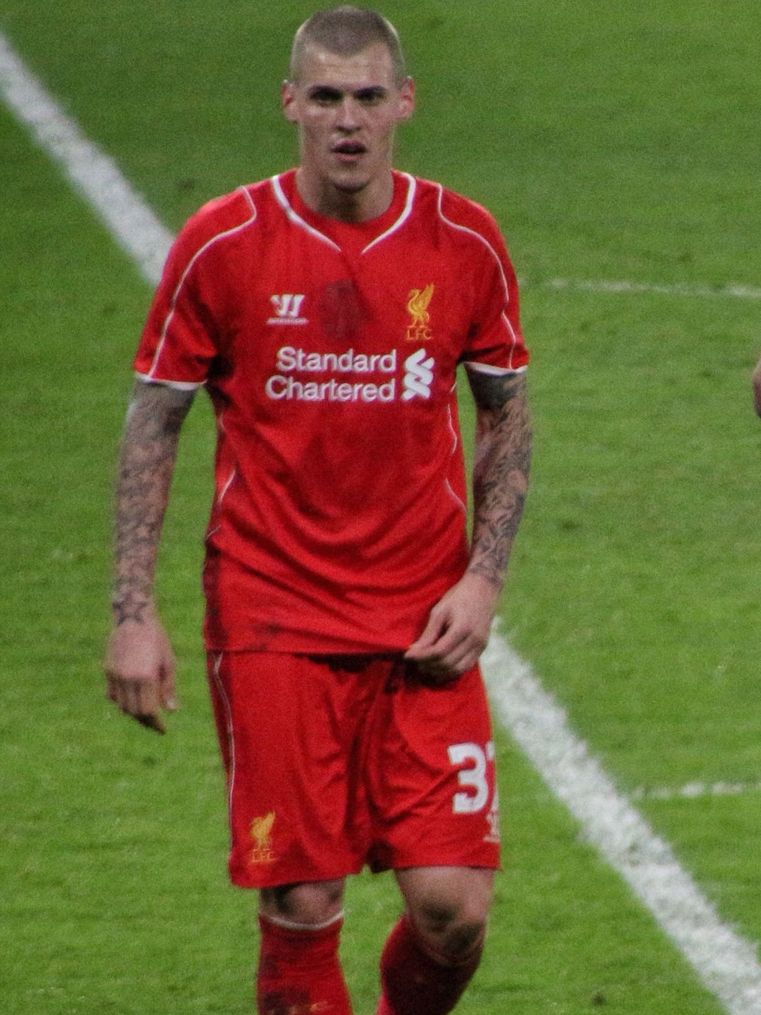 מרטין שקרטל במדי ליברפול